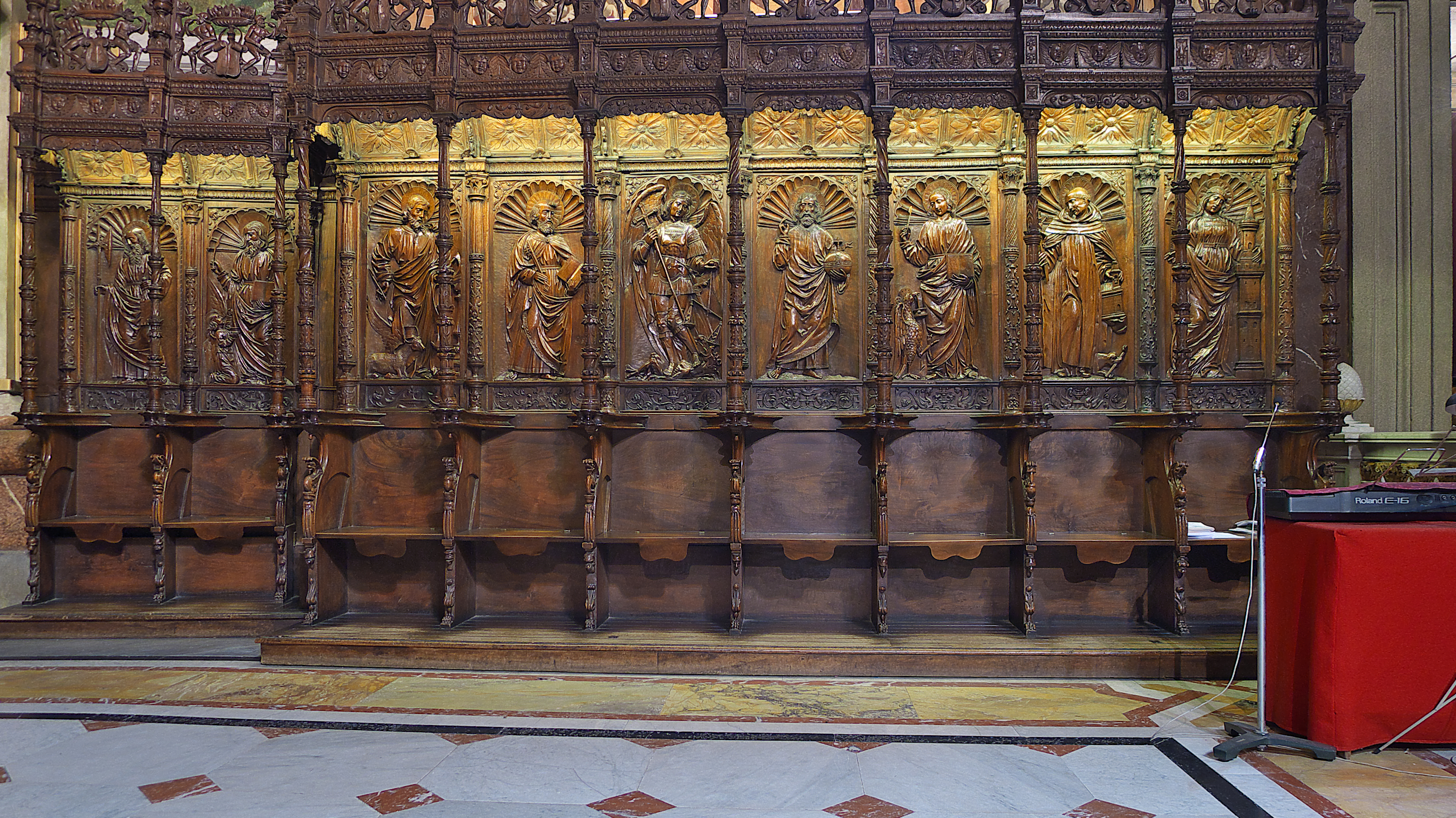 Sillería procedente del Monasterio de El Parral, obra de Bartolomé Fernández (1526).